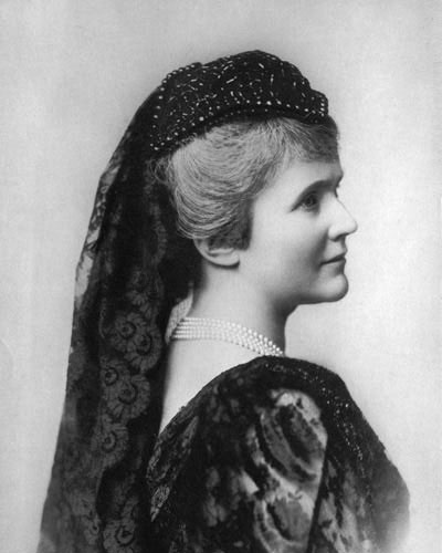 Königin Elisabeth von Rumänien - "Carmen Sylva" (1843-1916 geb. Prinzessin zu Wied) Königin Elisabeth von Rumänien war die Gemahlin König Karls des